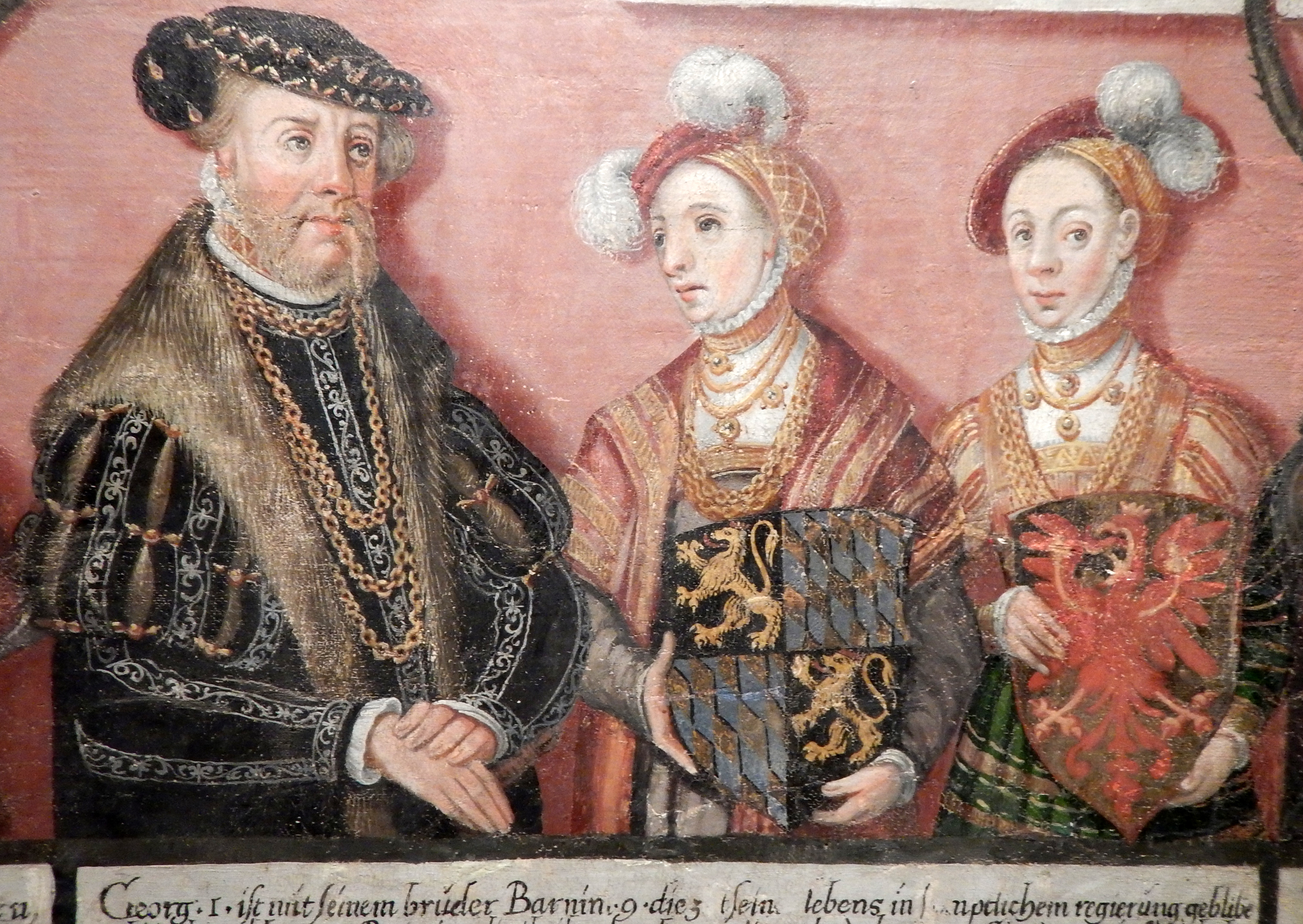 Georg I. von Pommern mit seinen beiden Gemahlinnen Amalie von der Pfalz und Margareta von Brandenburg.